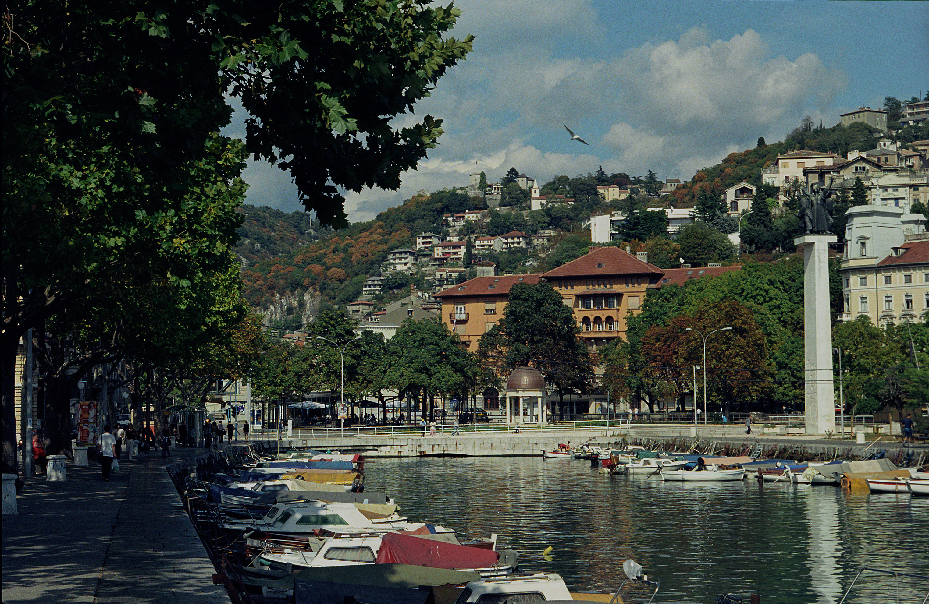 Rijeka - kanał, w głębi twierdza Trsat